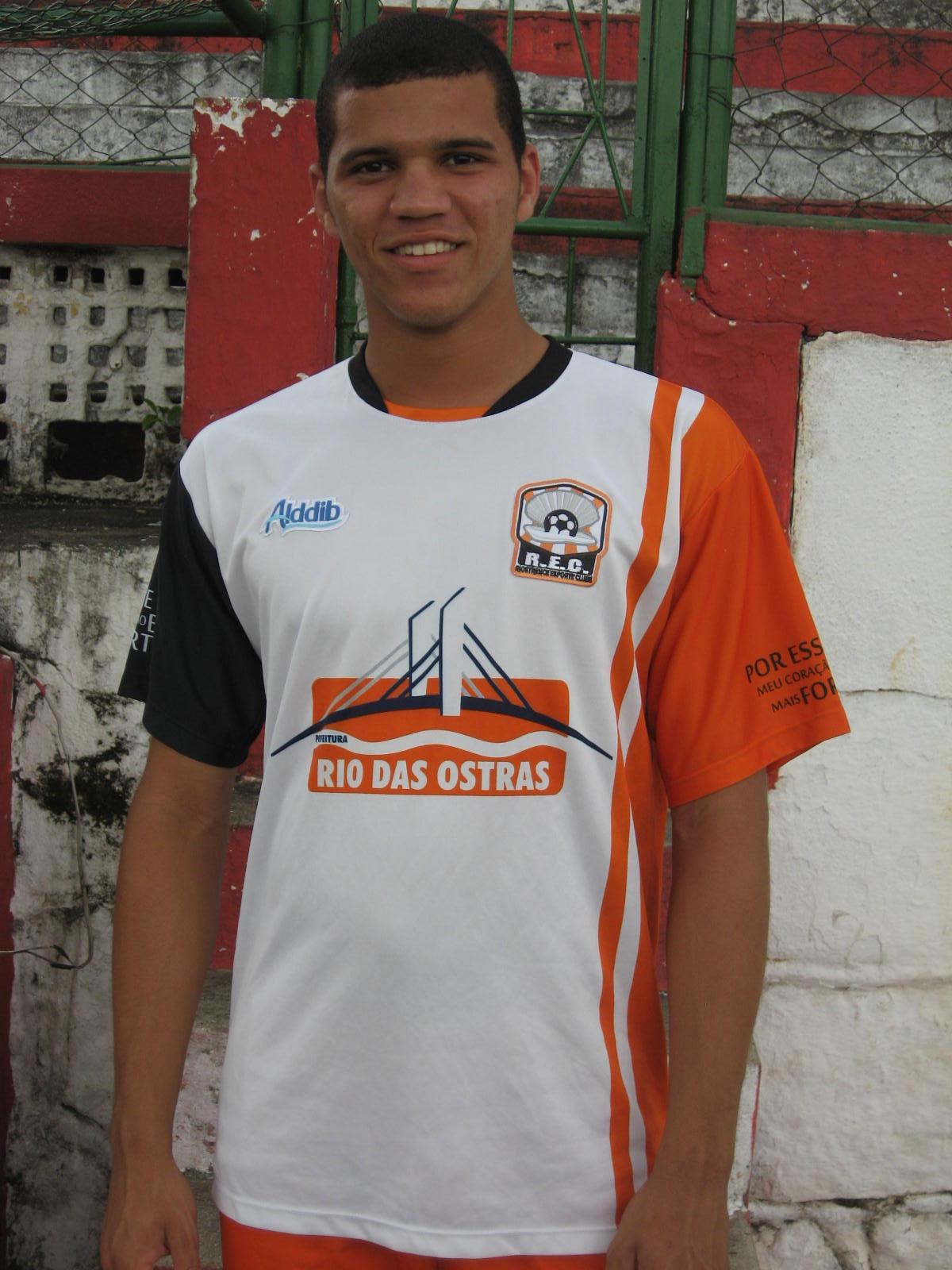 Atleta profissional do Riostrense EC, em 2009.